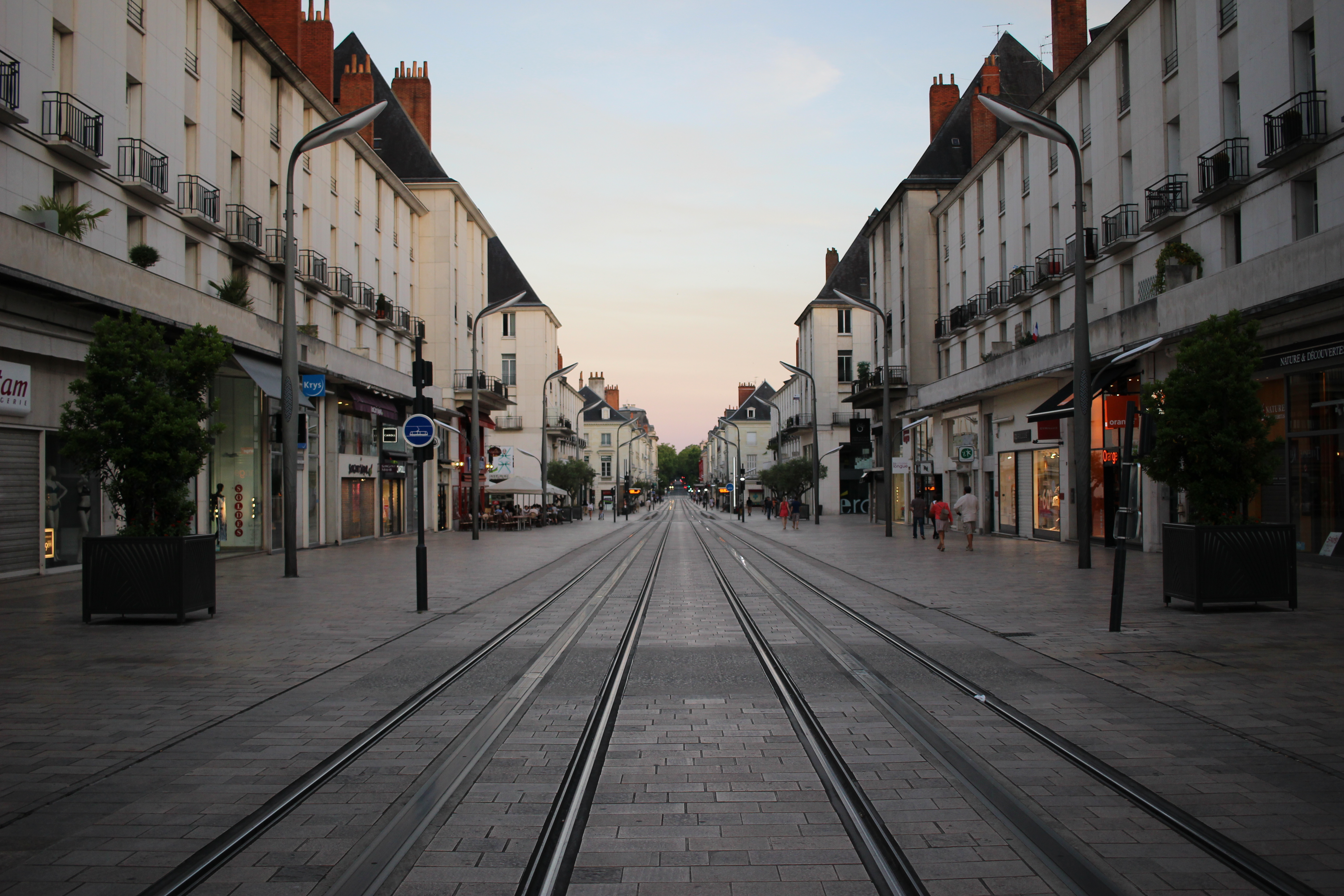 Photographie avec les rails du tramway de Tours, direction Sud. Photographie prise dans la Rue Nationale de Tours (France).